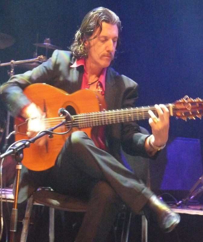 Titi Robin en Septembre 2011